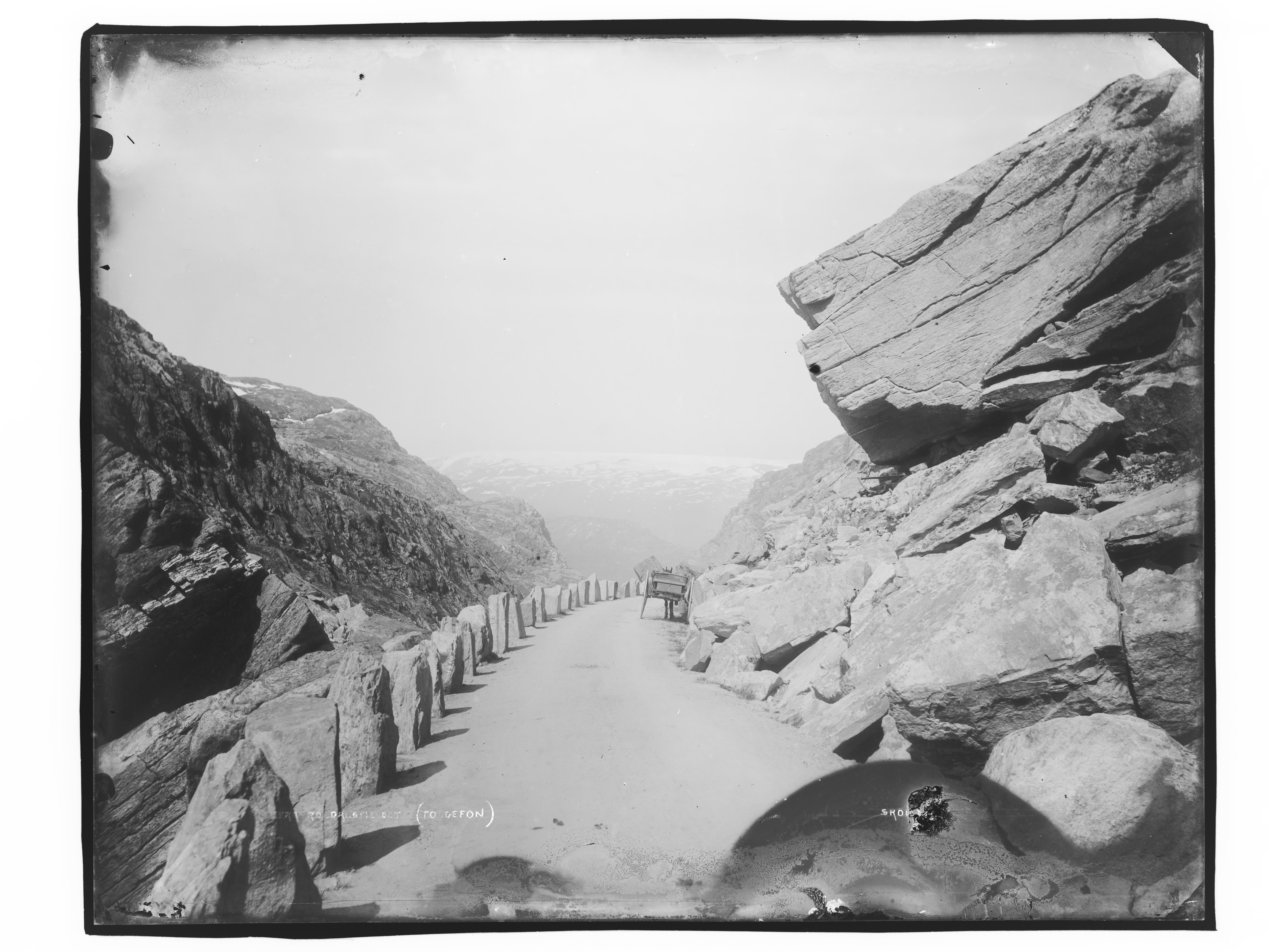 Påskrift negativ: Fra Röldalsfieldet (Folgefon) Sköien Påskrift konvolutt: Fjeldvei M.Skøien [Riksantikvaren] Sted: Folgefonna,Hardanger,Røldalsfjellet Kommune: Odda Fylke: Hordaland Tagger: landskap fjellvei stabbestein